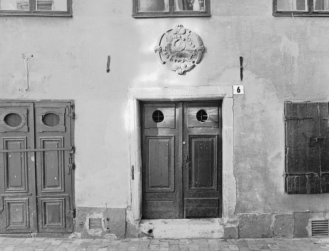 Österlånggatan 6